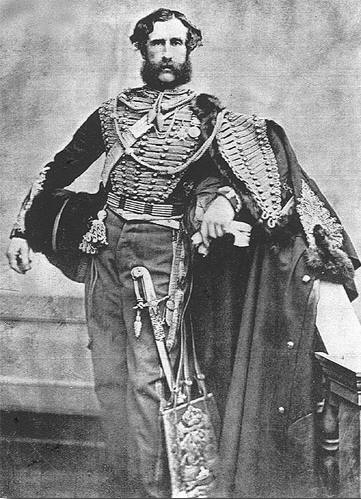 Lt. Alexander Dunn VC, 11th Hussars 1854